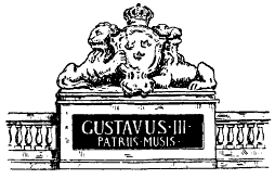 "Frontespisens krön å gamla operahuset." Ur Nordisk Familjebok.